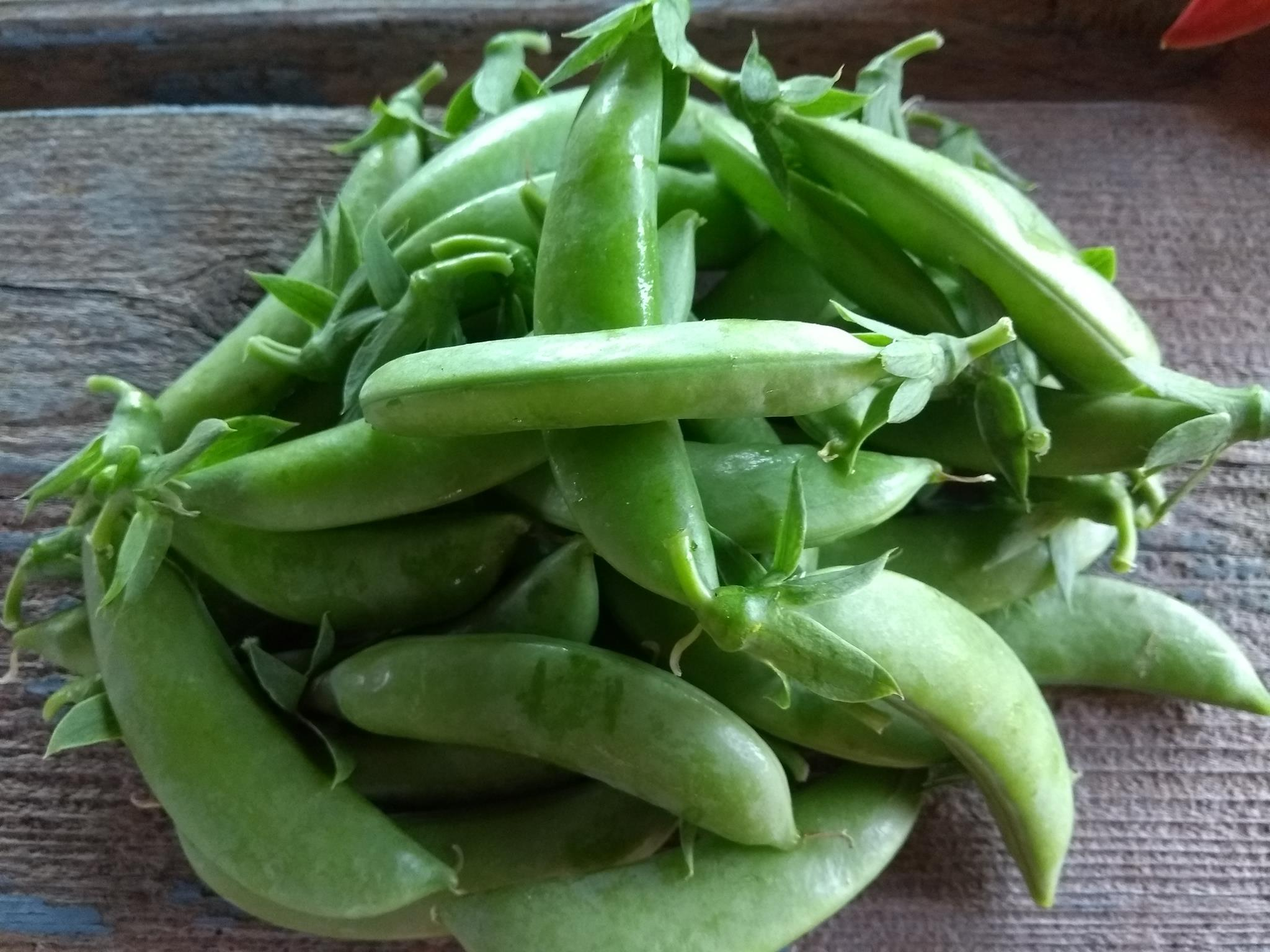 Pois sucré : comme un mange-tout, mais en très dodu, croquant et juteux.